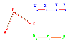 Segmento de Reta, feito por Guilherme A. de M. e Silva Teixeira.